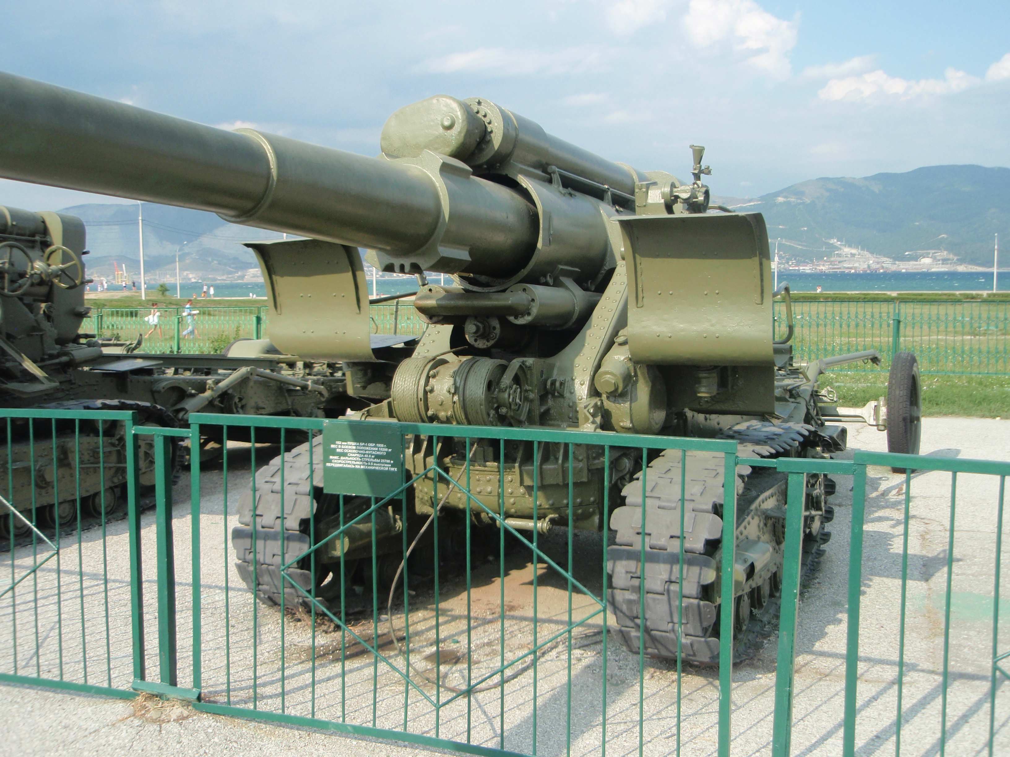 Советская 152-мм пушка большой мощности Бр-2 в музее-заповеднике «Малая земля» (г.Новороссийск)